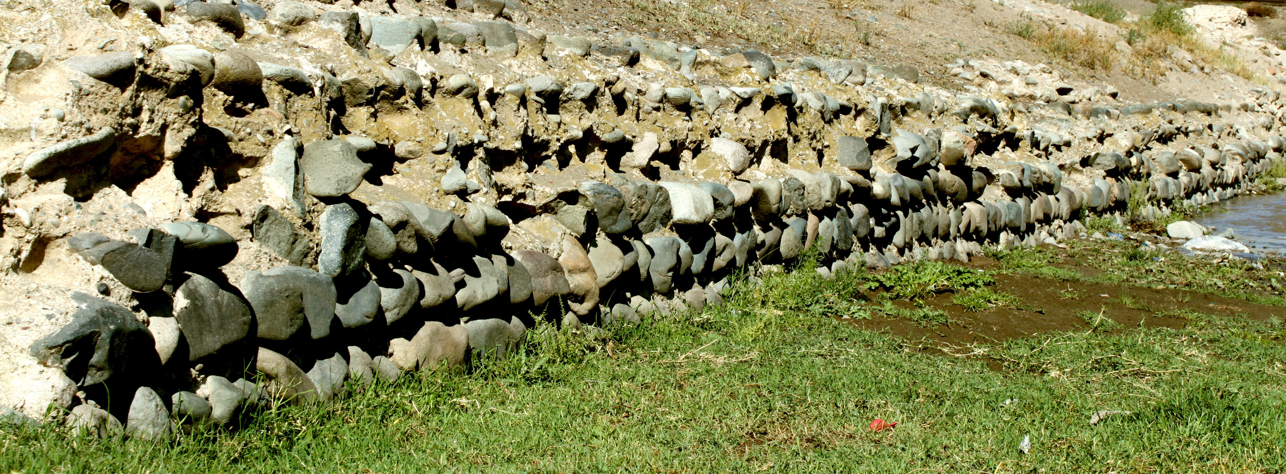 Gəncə qalası (daxili divar qalıqları)